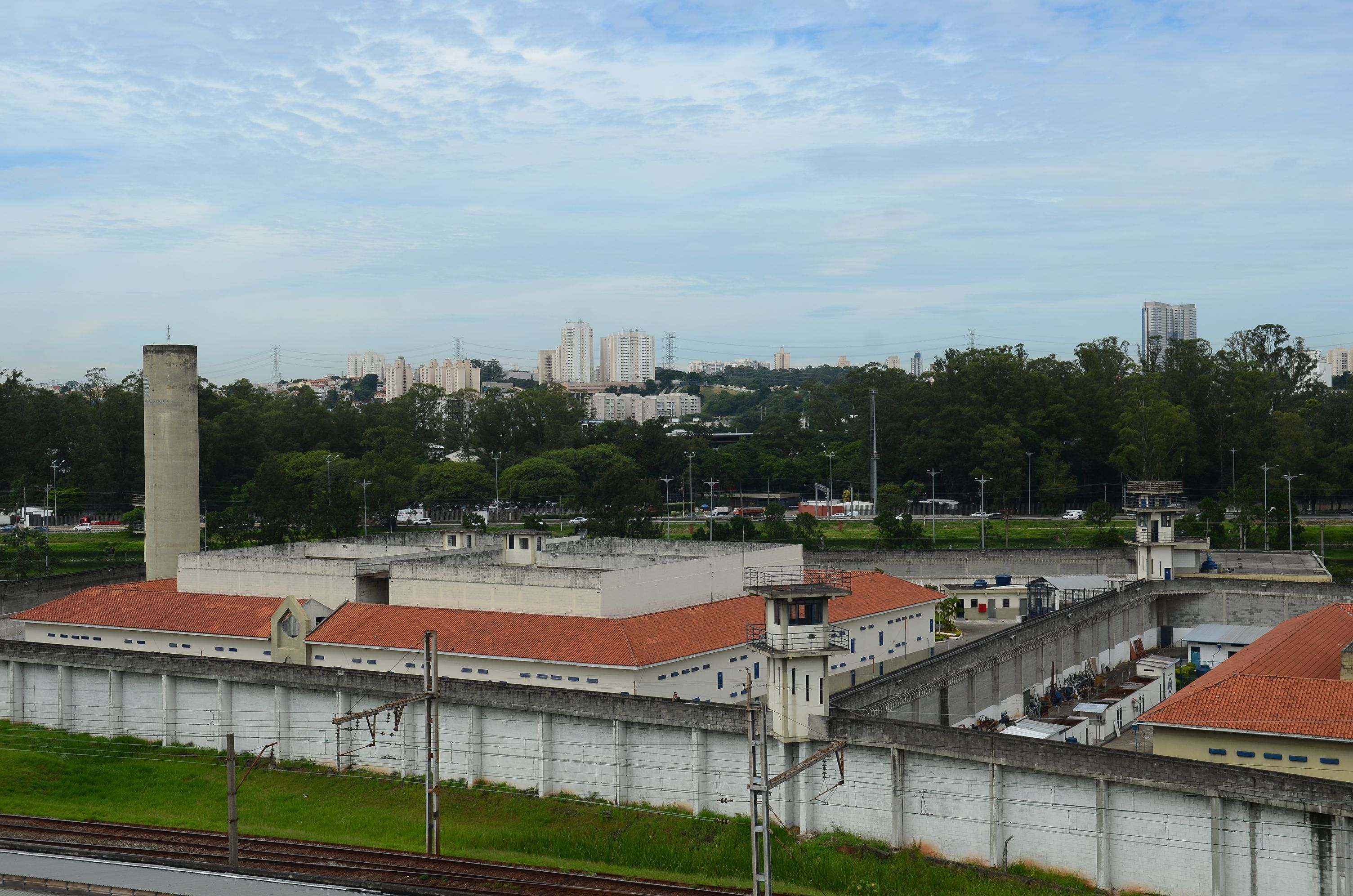 São Paulo - Centro de Detenção Provisória (CDP) Pinheiros III, zona oeste da capital paulista.